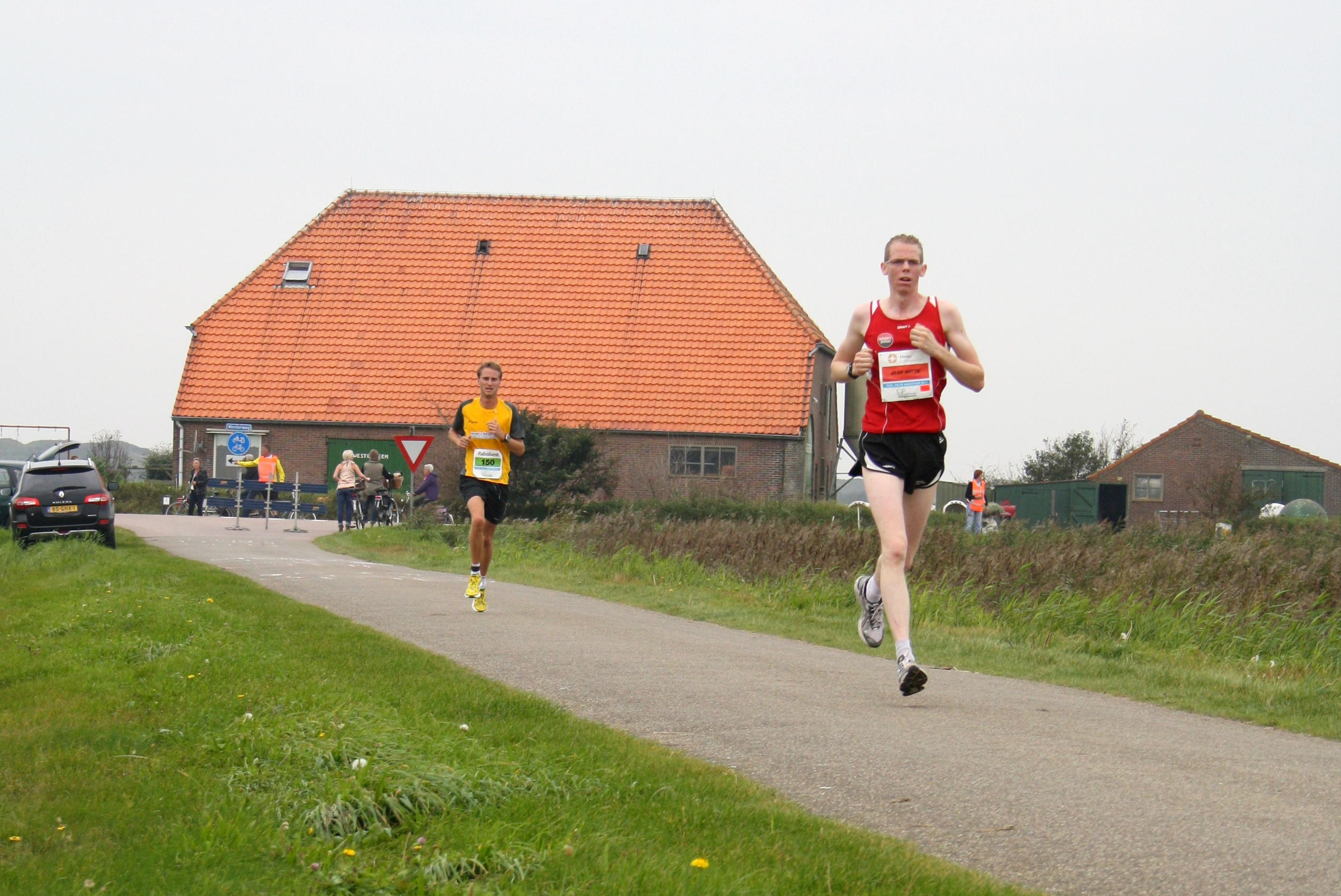 Eén van de koplopers bij de halve marathon op Texel 2011